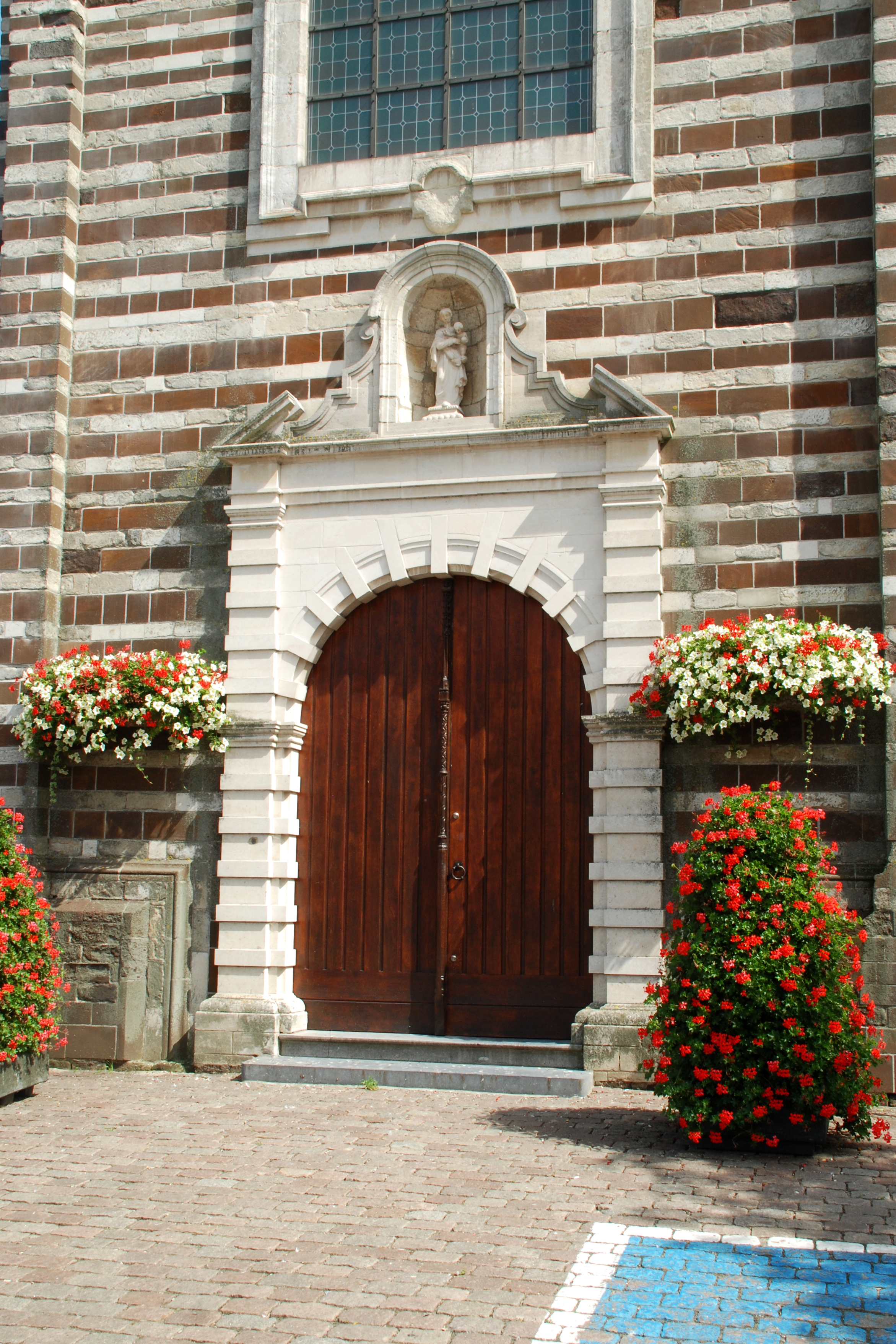 Belgique - Brabant flamand - Rotselaar - Église Saint-Jean-Baptiste de Werchter